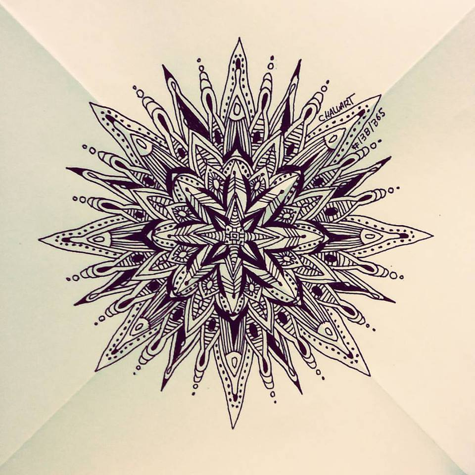 Con esta técnica se va repitiendo un patrón de manera circular, el resultado es armónico e intuitivo, pero al mismo tiempo controlado, se crea un mandala.